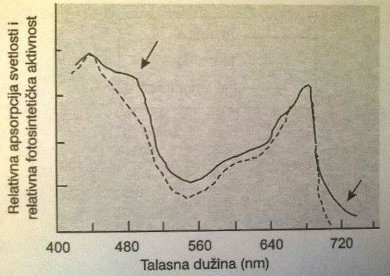 Podudarnost je najmanja na talasnoj dužini oko 480 nm i na talasnoj dužini većoj od 680 nm, gde sva apsorbovana svetlost nije iskorišćena za fotosintezu.